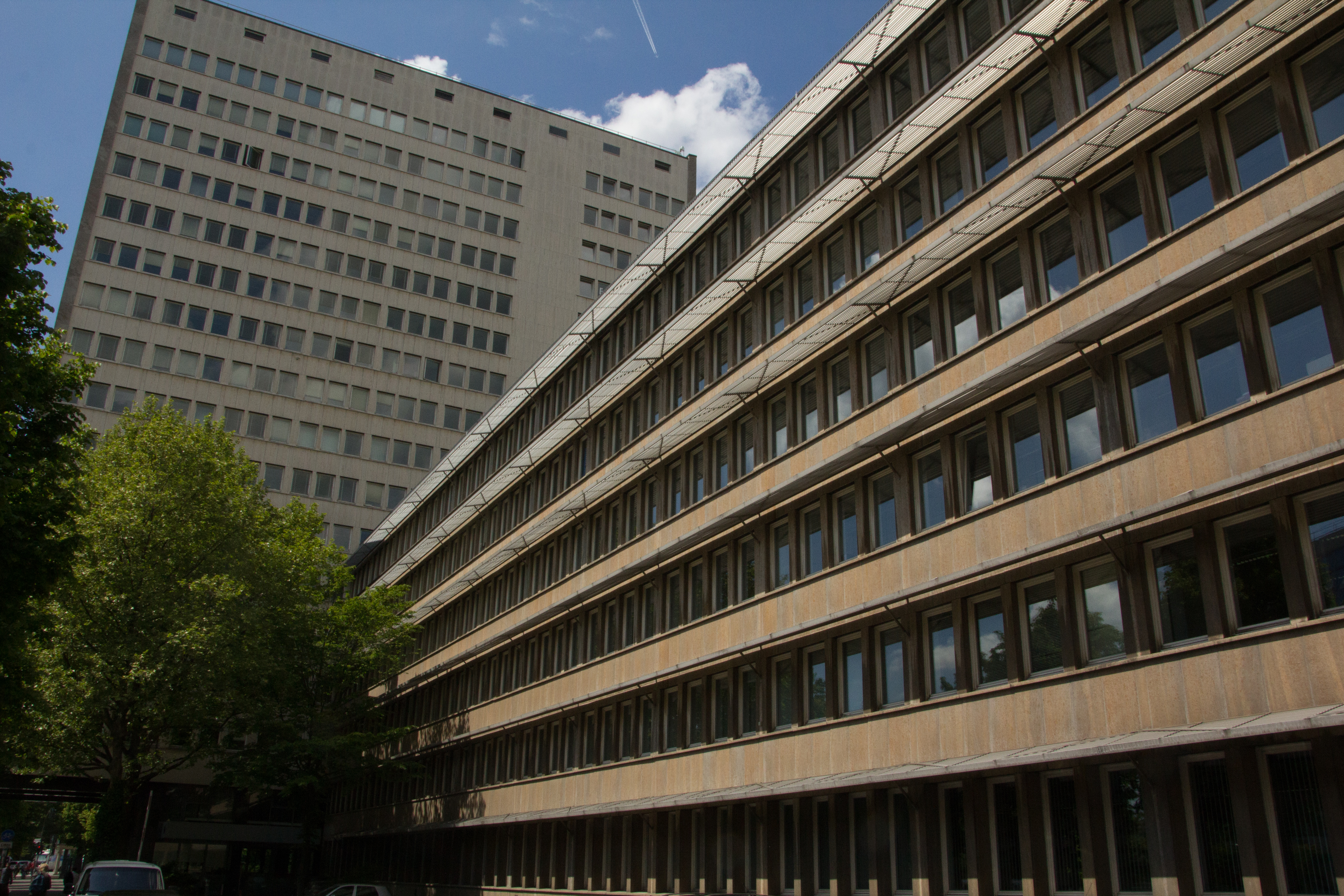 Ministerium in Düsseldorf